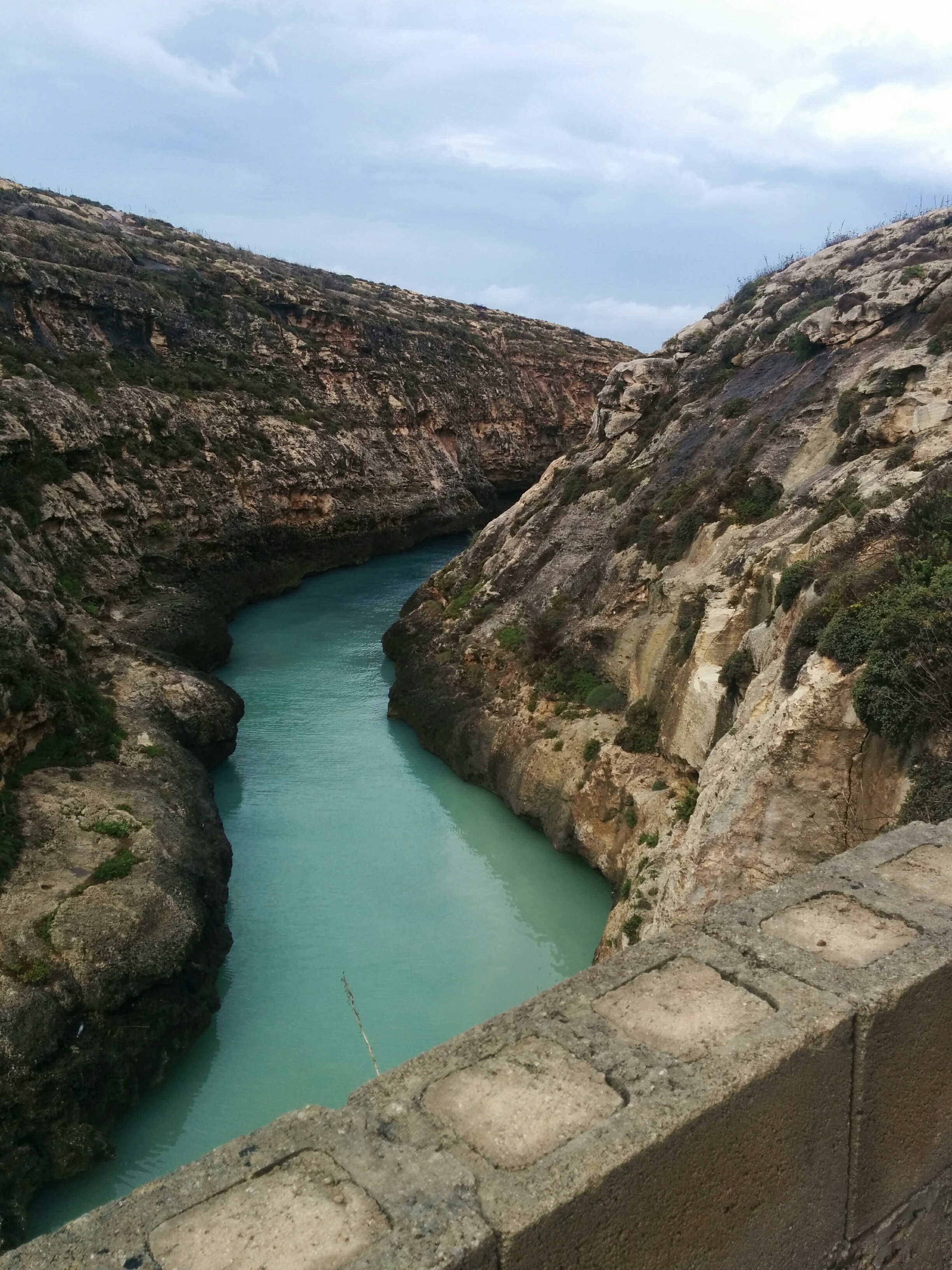 Badställe på Gozo